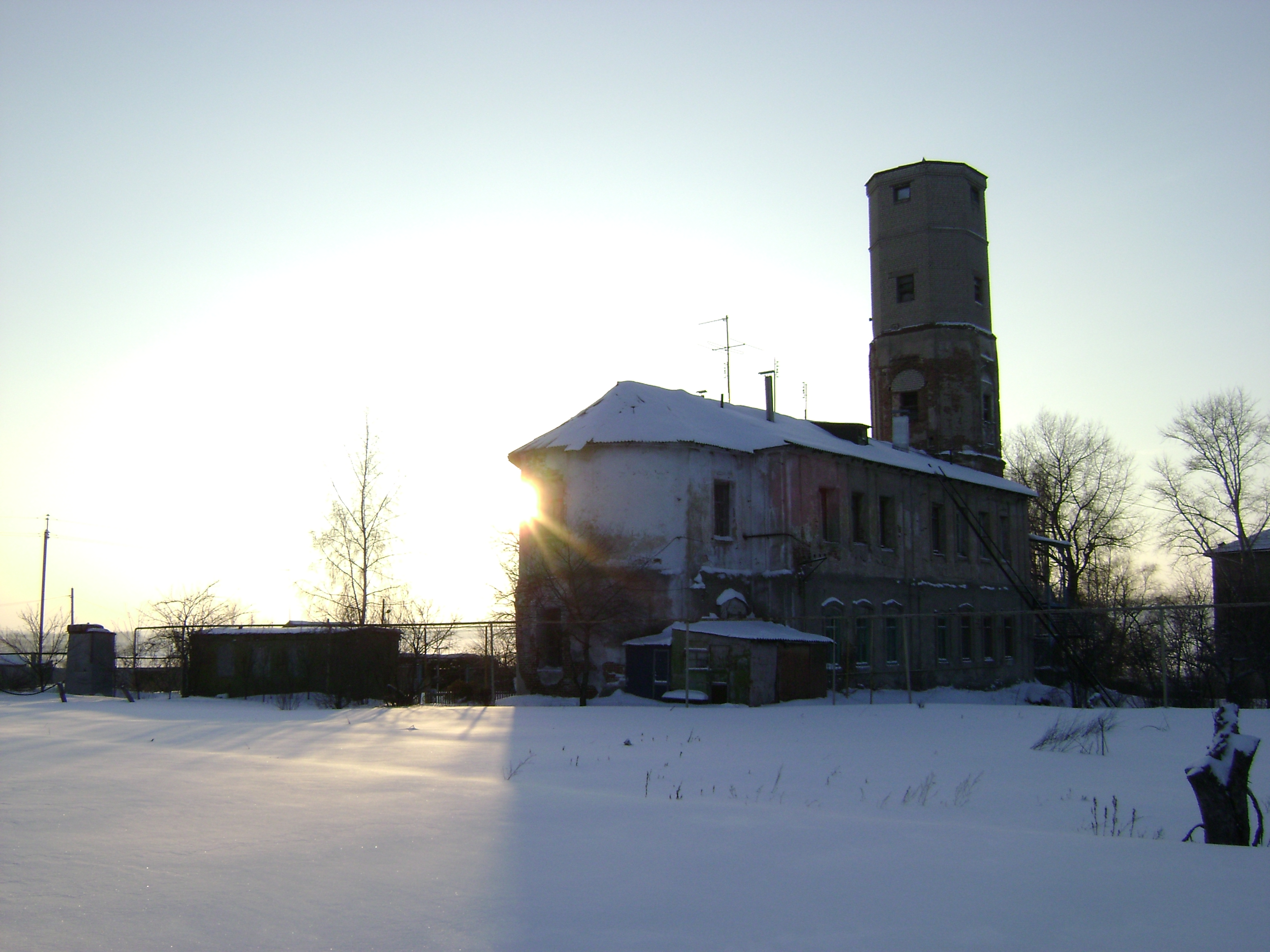 Покровская церковь в Горожанке зимой. (Рамонский район, Воронежская обл., Россия) Вид с северо-восточной стороны.